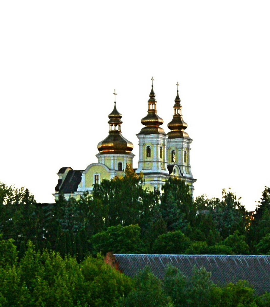 Україна. Вінниця, Преображенський собор